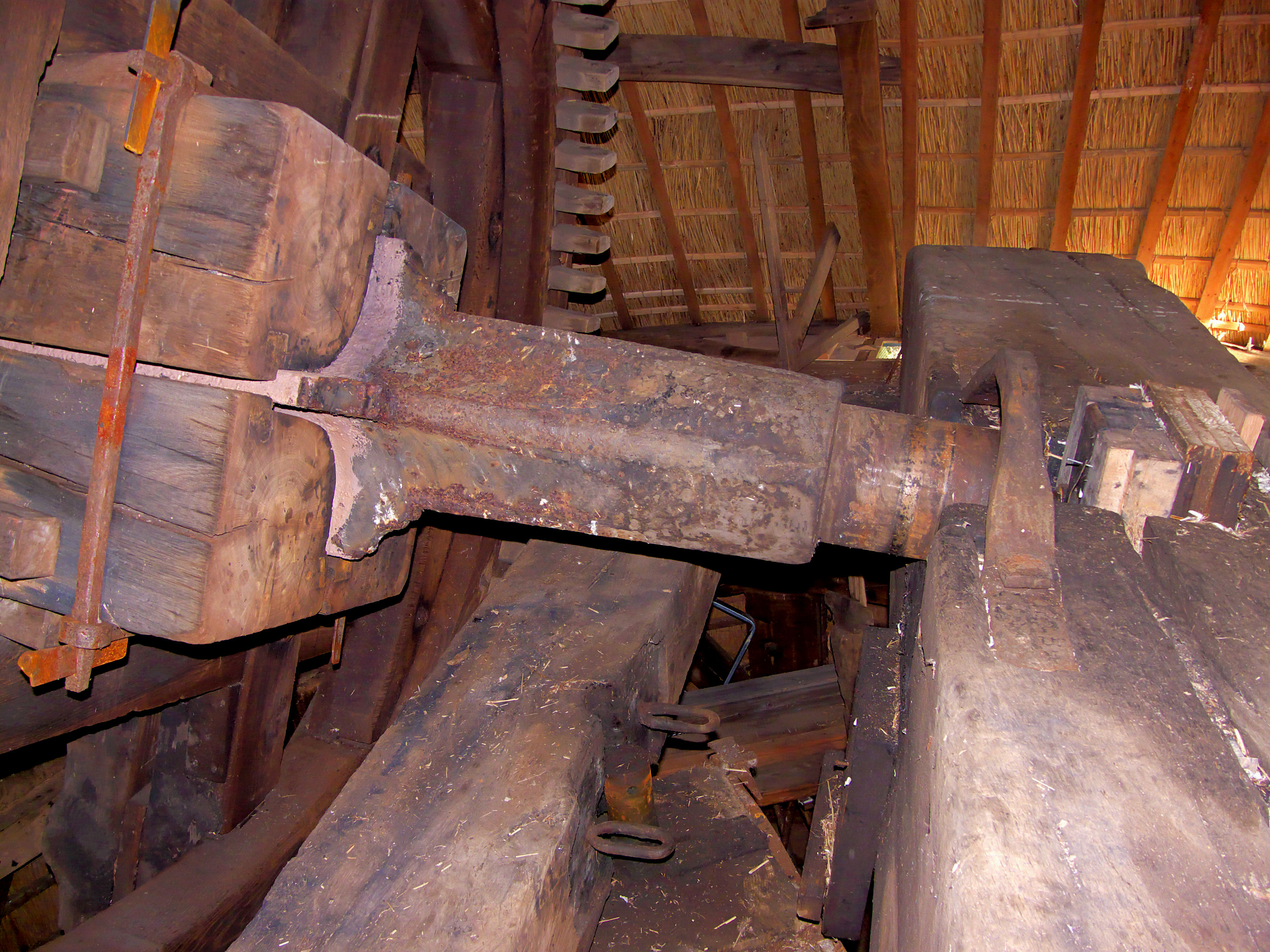 Molen De Hoop, Elspeet, pen bovenas. Penbalk vlak naast ijzerbalk.